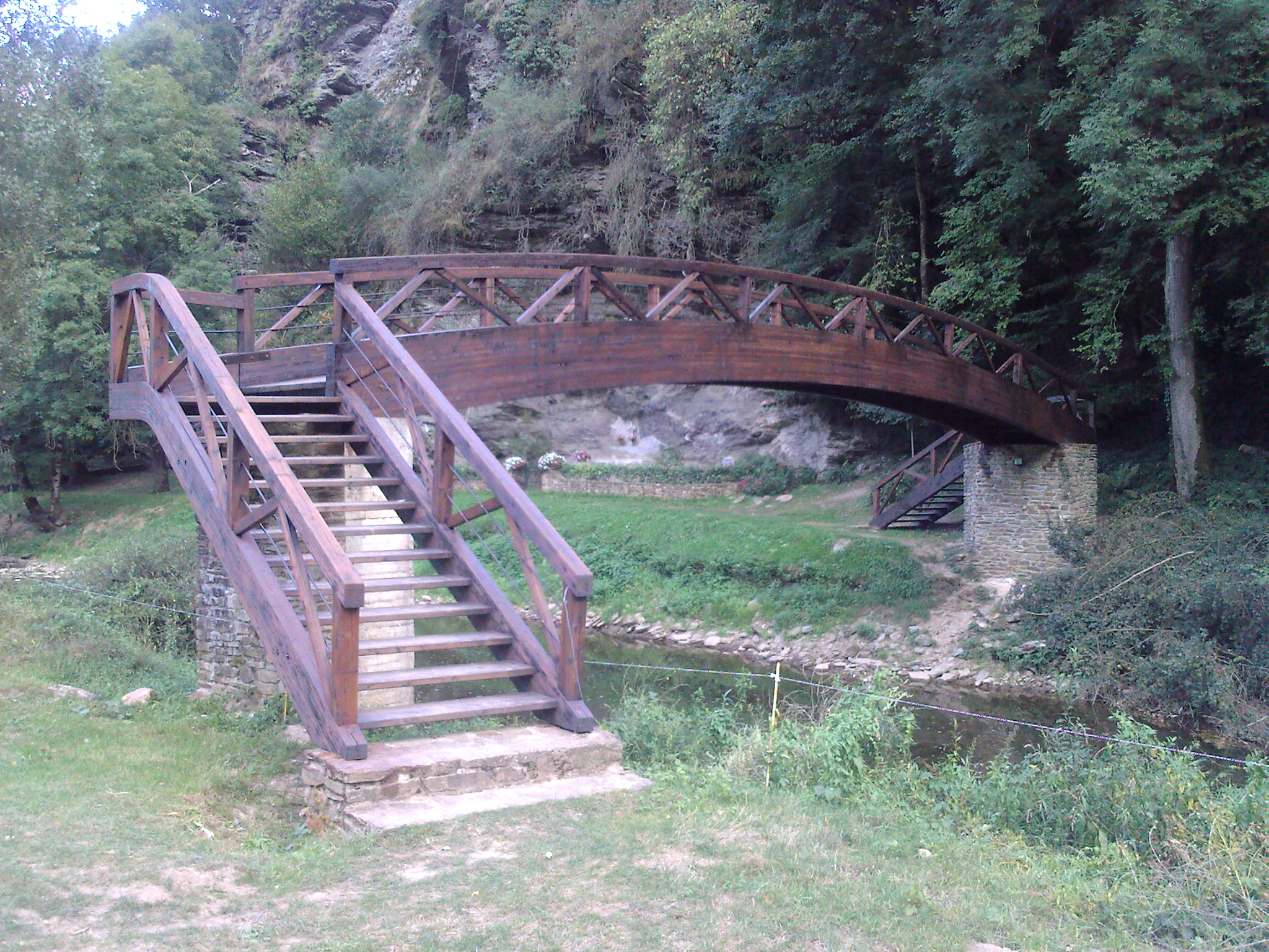 Passerelle d’accès au site du Lourdou, à Belcastel (en Aveyron)